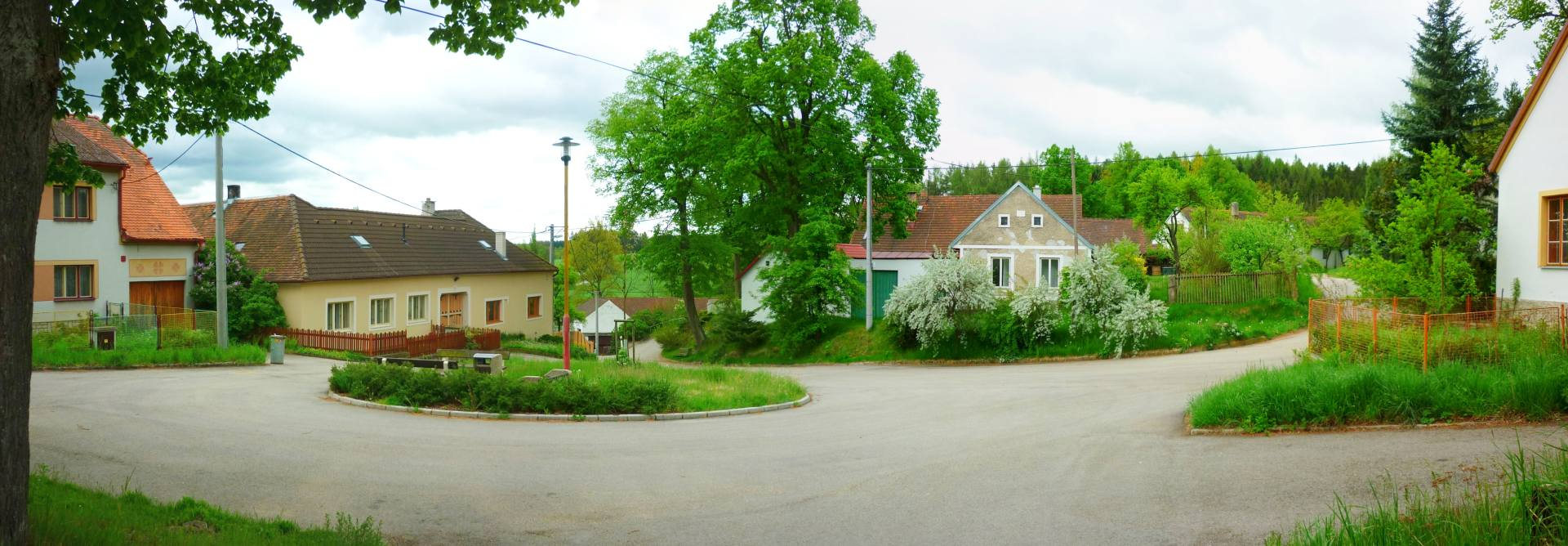 Myslůvka - náves